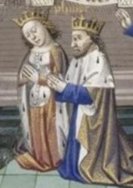 Bertrada z Montfortu a Filip I.